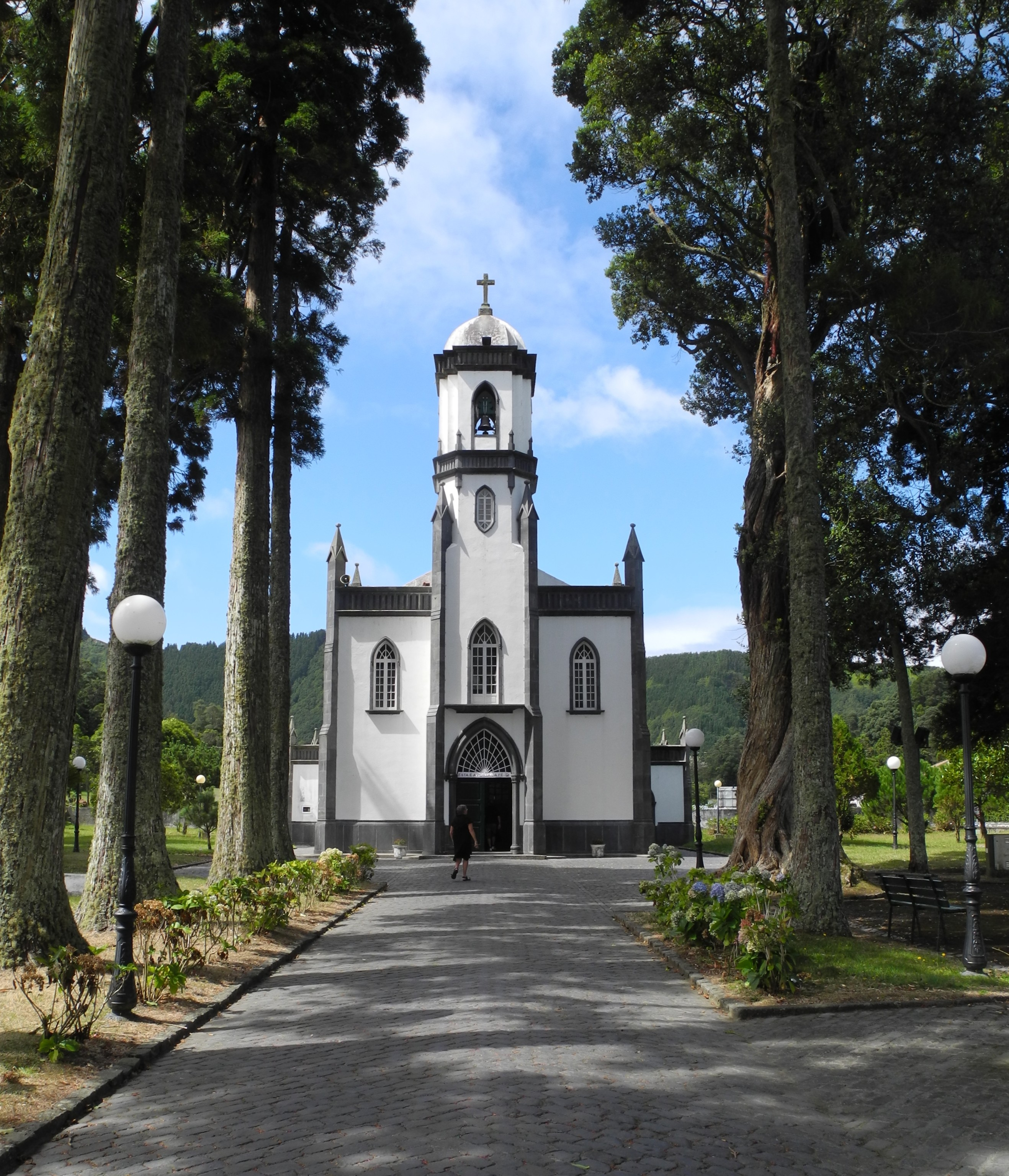 Sete Cidades (Caldeira) - Kirche